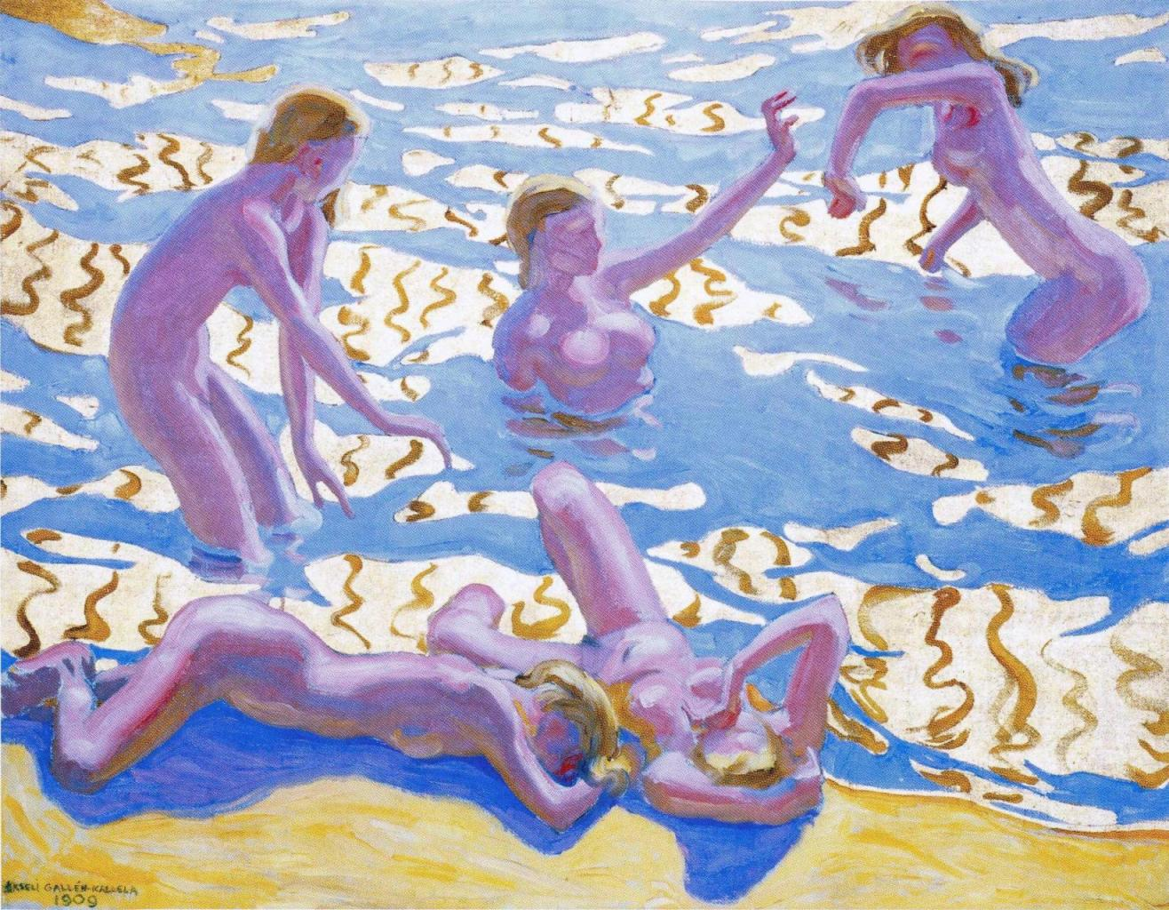 Akseli Gallen-Kallelan Kalevala-aiheinen maalaus. Kuuluu yksityiskokoelmaan. Teoksen pelkistetympi versio on Ateneumin kokoelmissa.